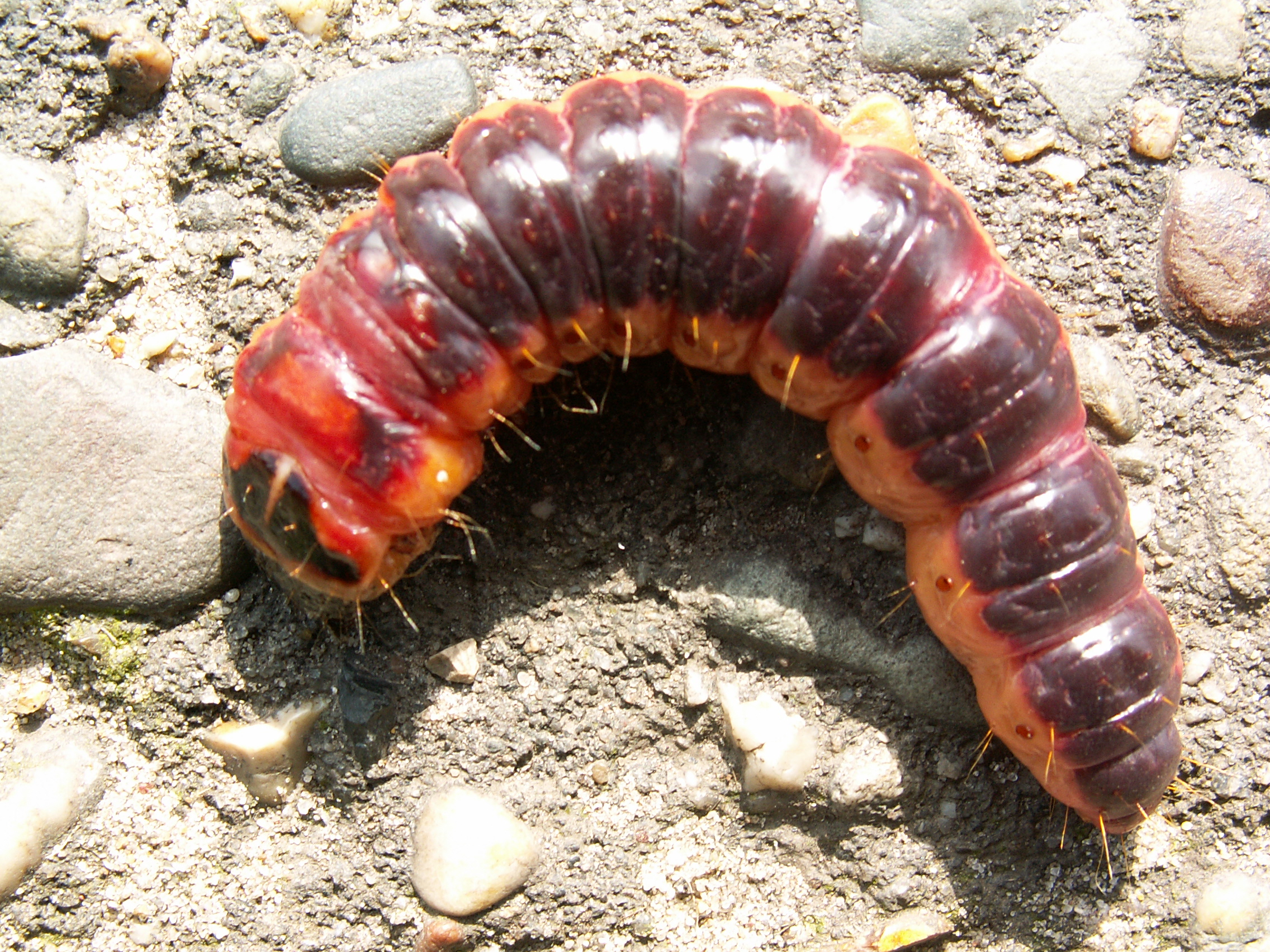 Cossus cossus